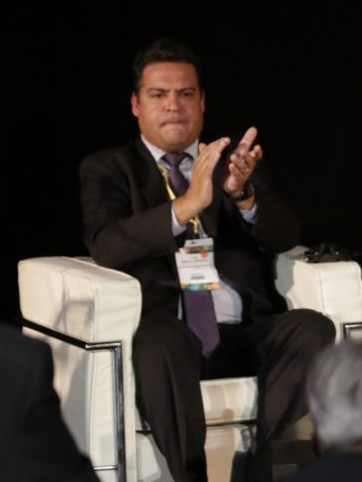 Varios momentos de la clausura del Foro Mundial sobre Violencias Urbanas y Educación para la Convivencia y la Paz